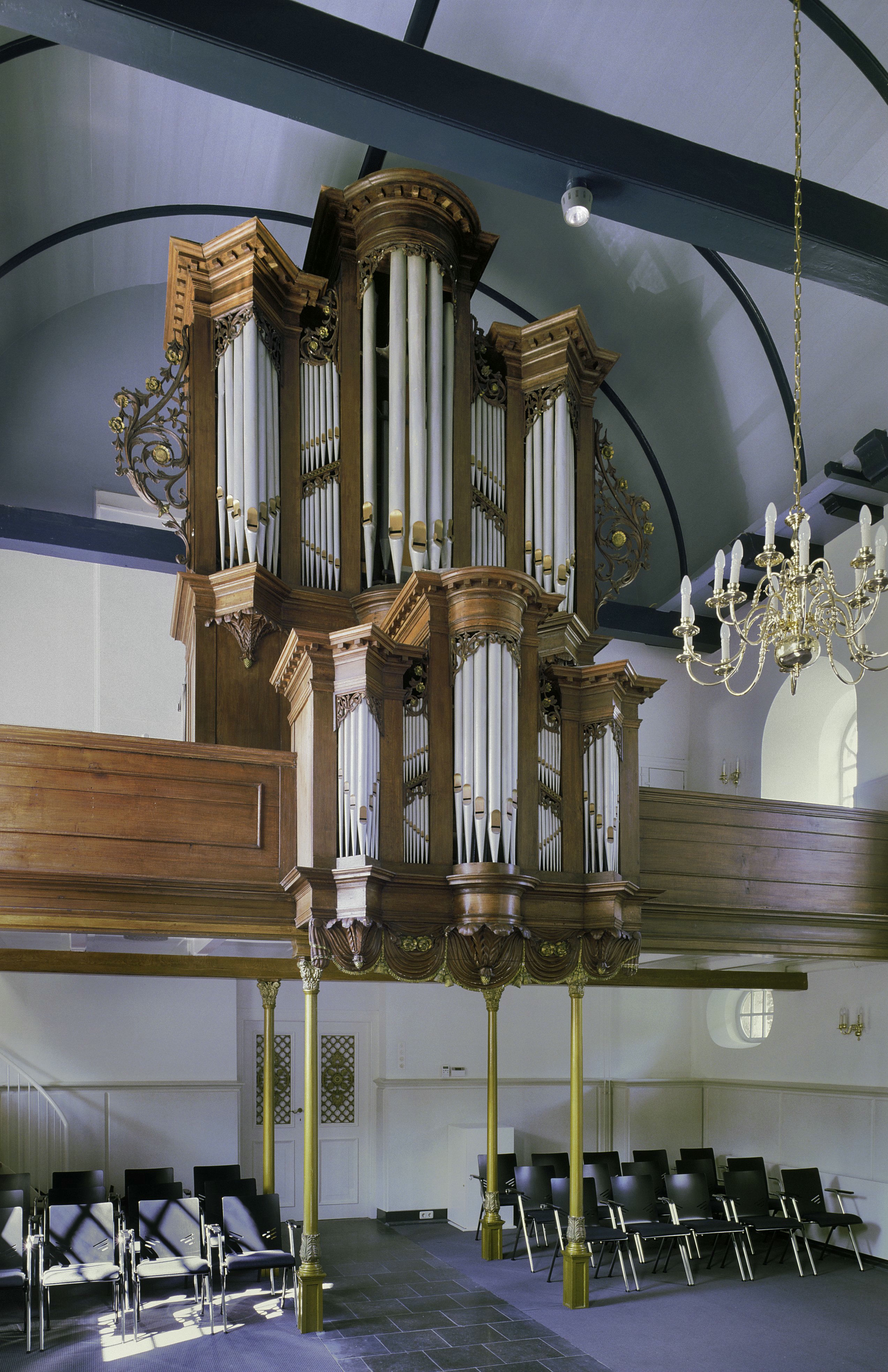 Nederlands Hervormde Kerk: Interieur, aanzicht orgel, orgelnummer 962 (opmerking: Gefotografeerd voor Het Historische Orgel in Nederland 1819-1840, bladzijde 269)